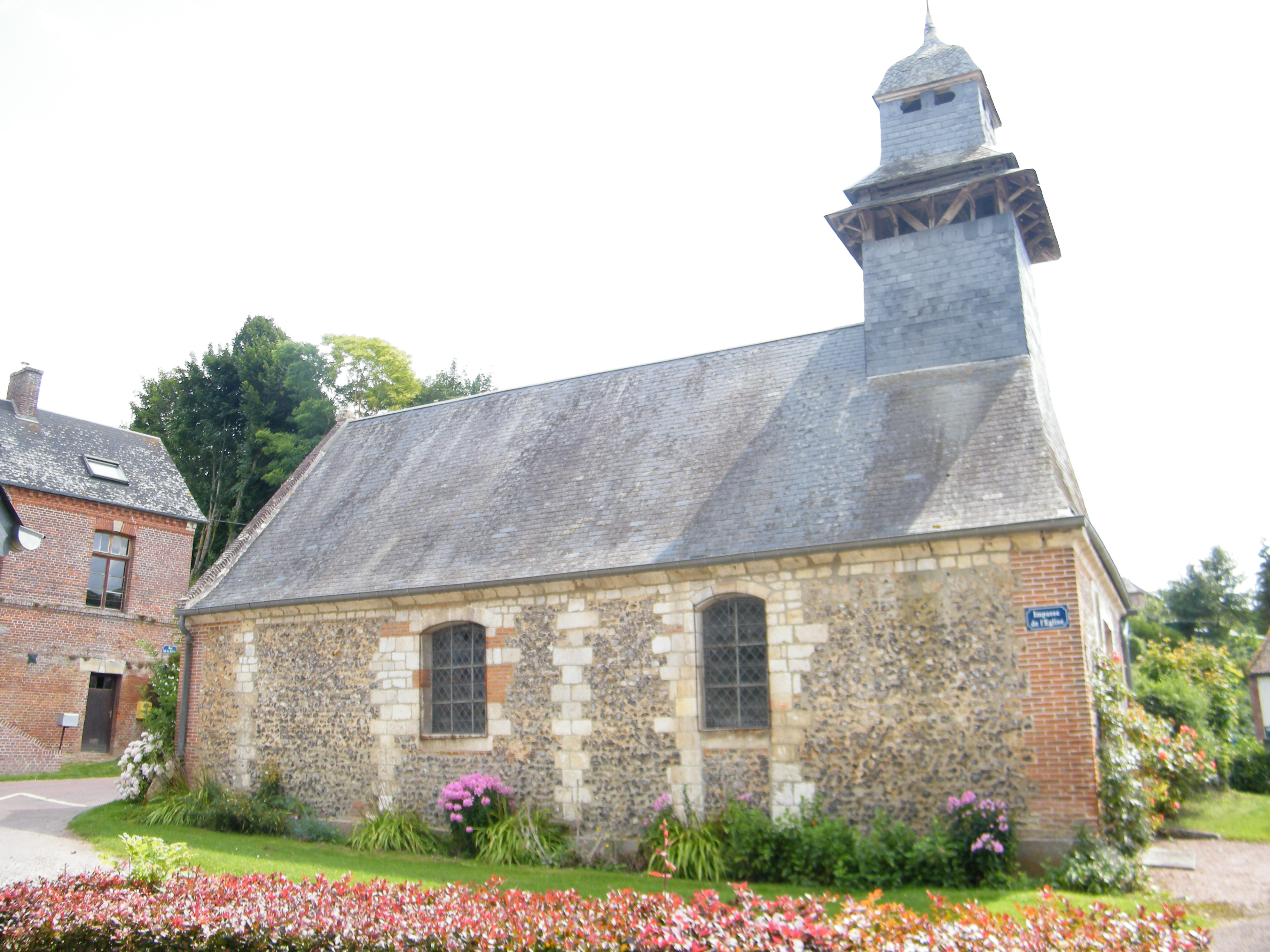 église.